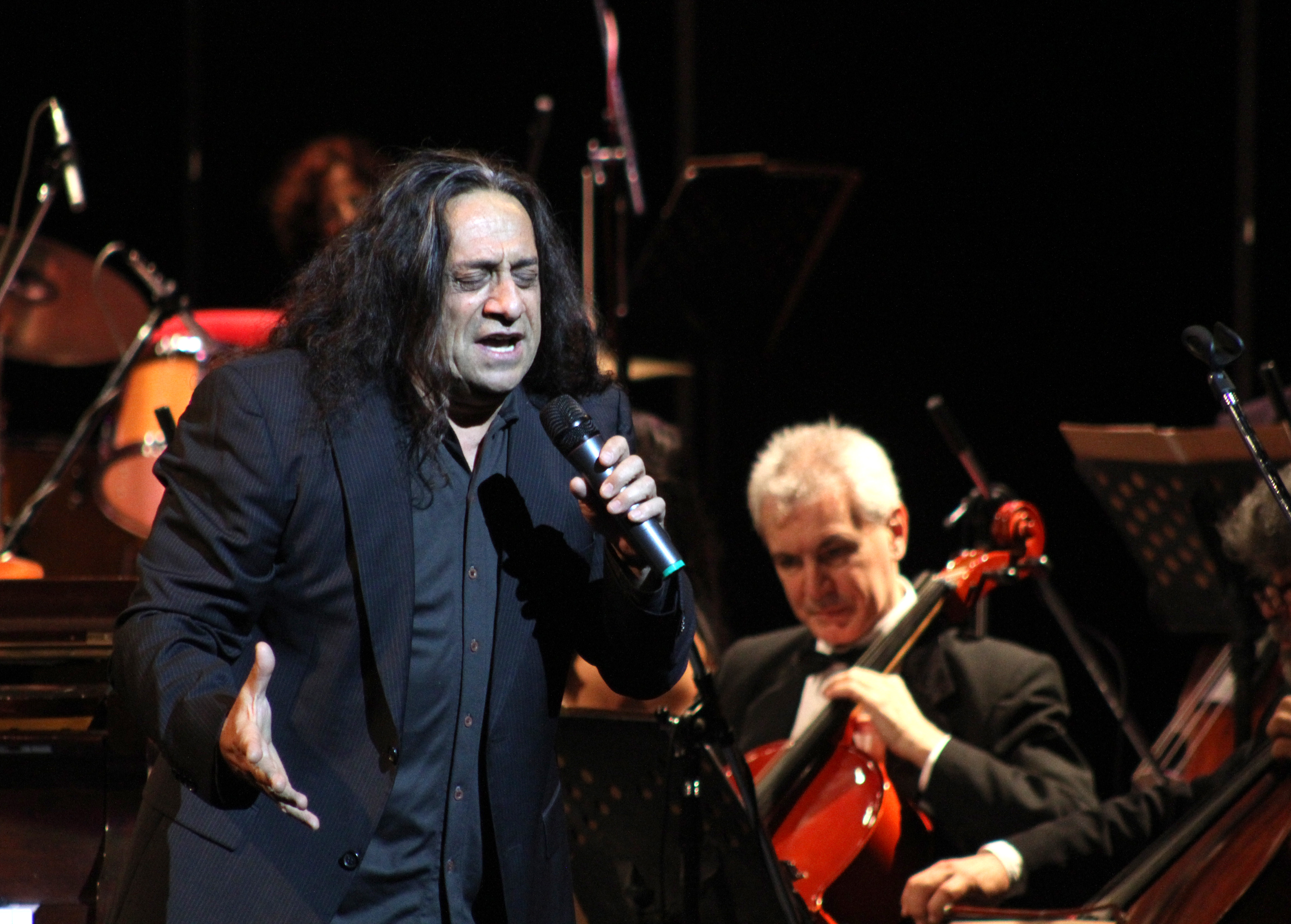 Omar Mollo con la Orquesta Nacional de Música Argentina "Juan de Dios Filiberto".